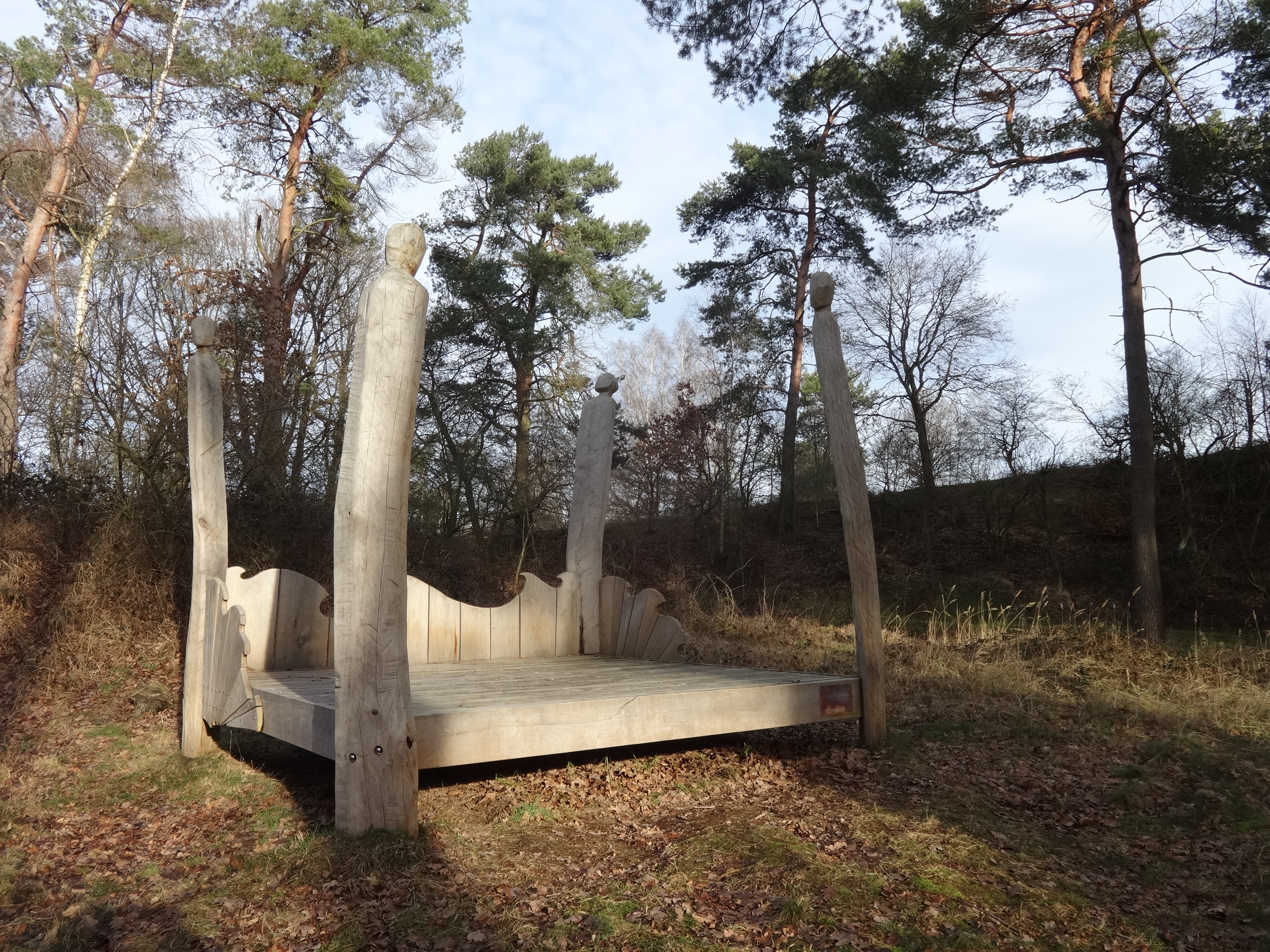 Die Brautrummel ist ein periglaziales Trockental im Hohen Fläming im Land Brandenburg. Es liegt auf der Gemarkung der Gemeinde Wiesenburg/Mark in der Nähe des Ortsteils Grubo.